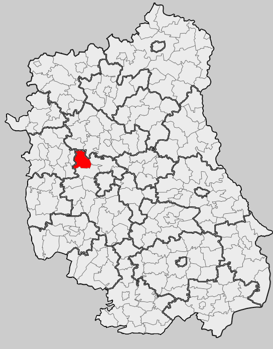 Map of gmina Garbów, Lublin county, Lublin voivodship Mapa gminy Garbów, powiat lubelski, województwo lubelskie